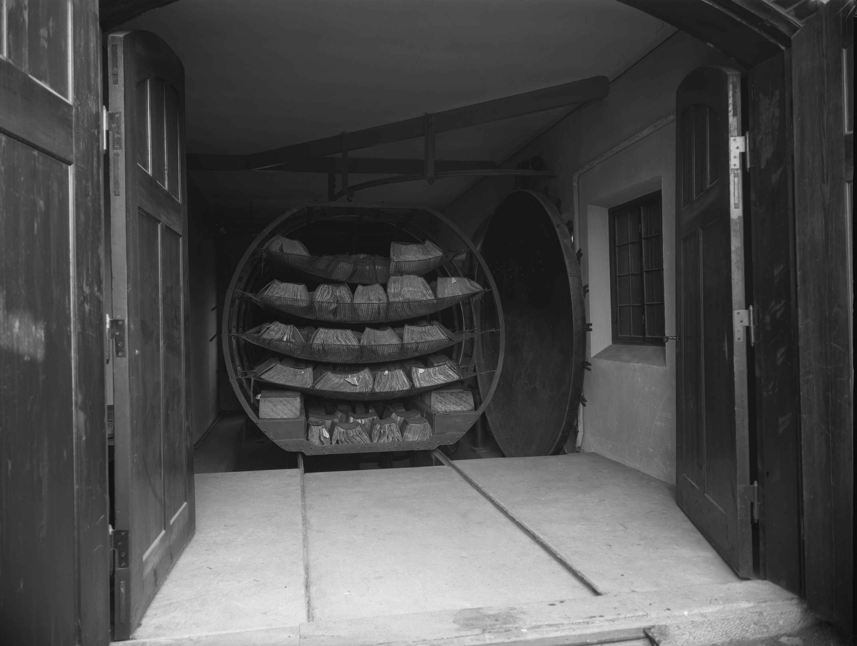 Nordiska museet. Desinfektionsugnen i ”Lusknäppen”, 1910-tal. Nordiska museets arkiv NMA.0078775